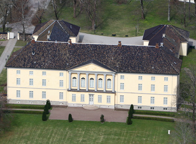 jarlsberg_hovedgaard